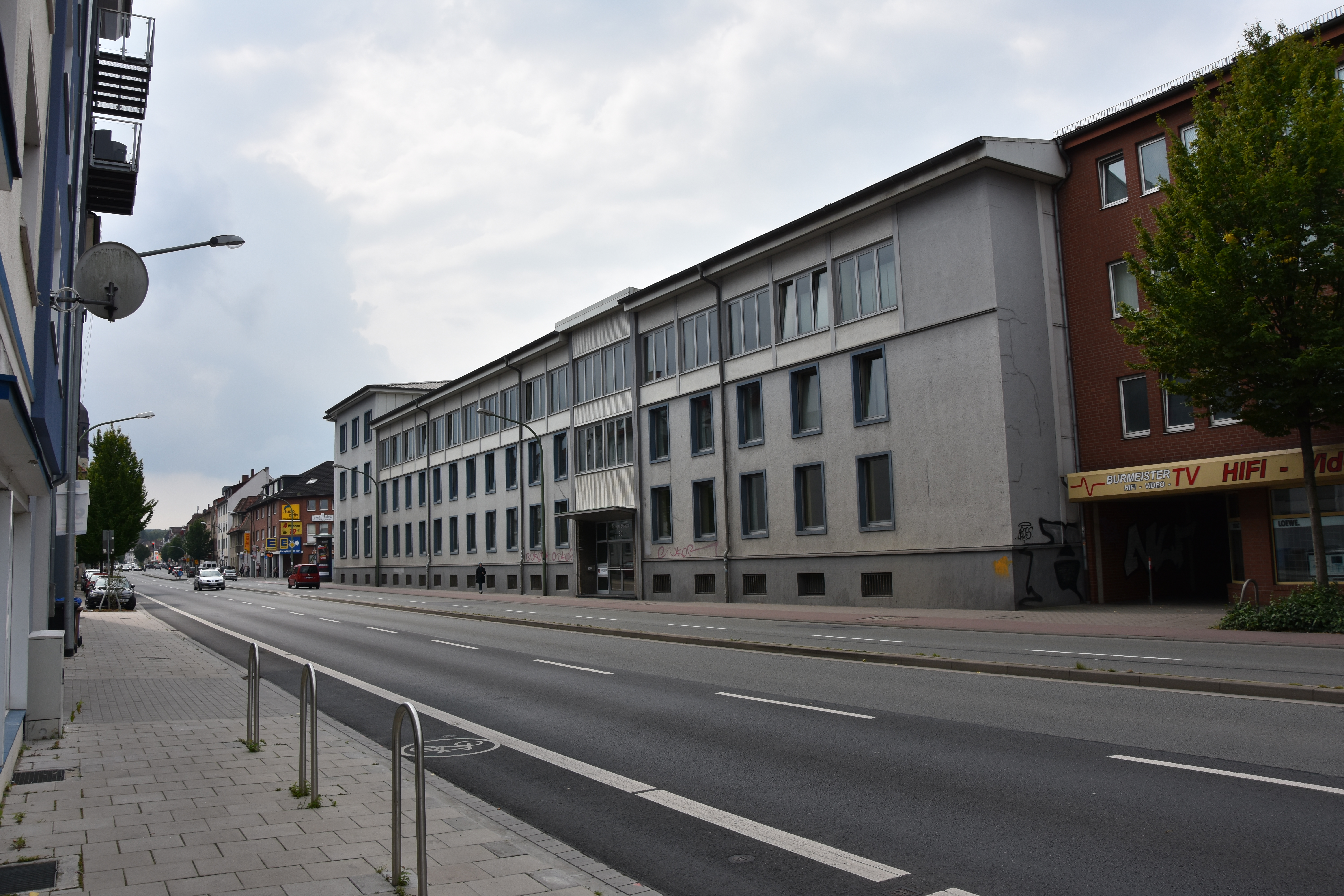 Hammersen AG ehemaliges Verwaltungsgebäude. Heute Landesamt für Soziales, Jugend und Familie - Außenstelle Osnabrück